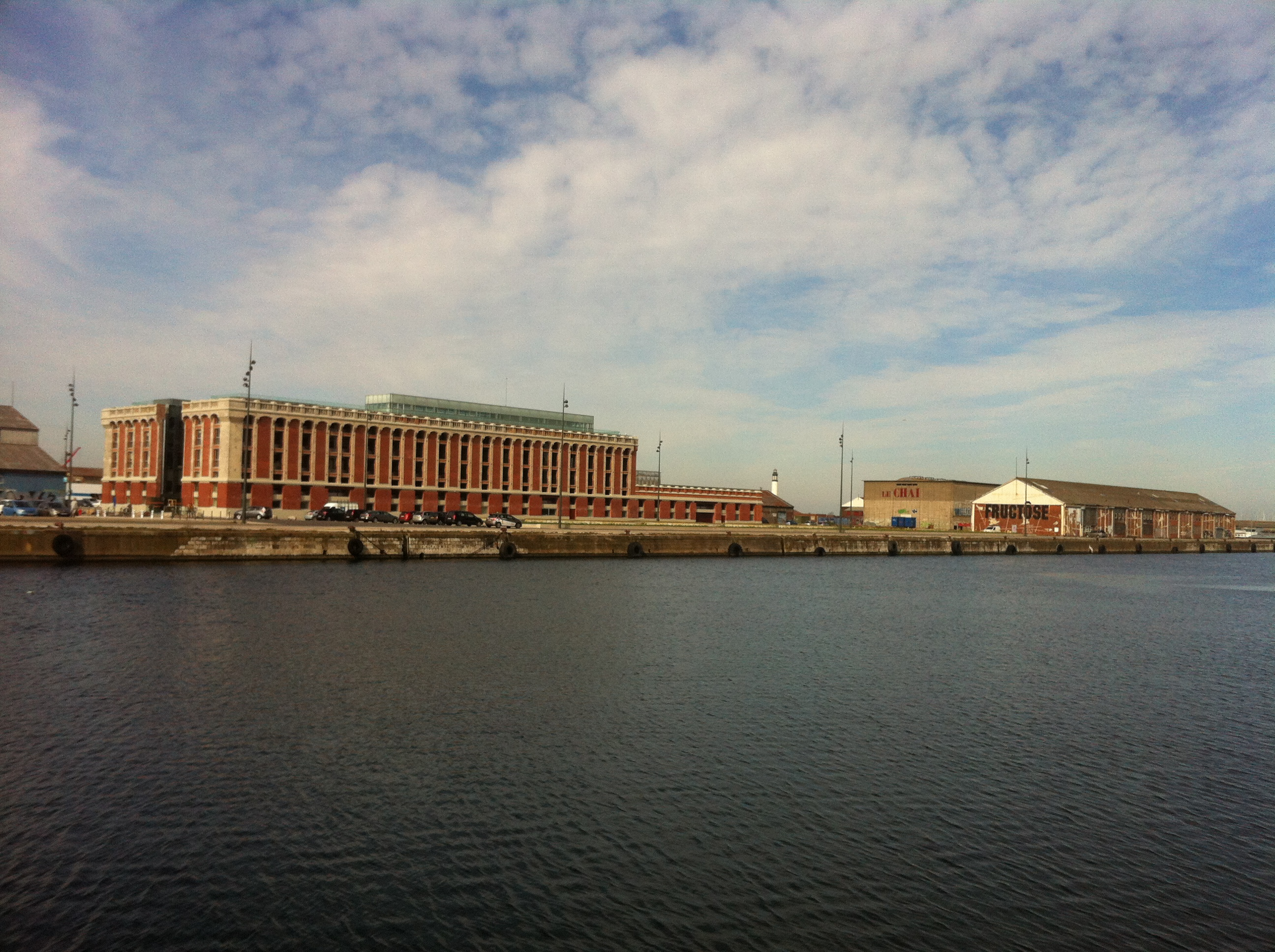 vue de la halle aux sucres et du môle 1